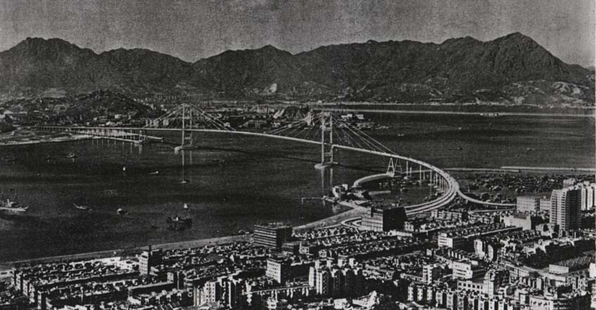 Model der Brücke über den Victoria Harbour aus den 1950er Jahren.